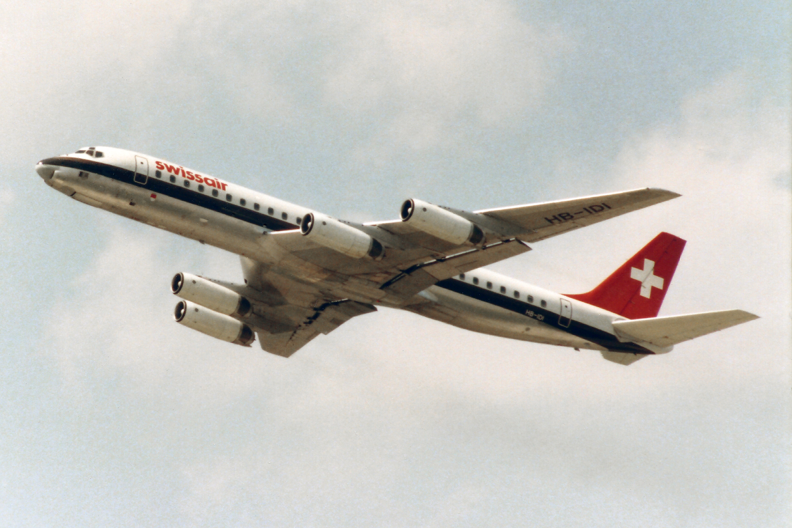 Zürich (- Kloten) (ZRH / LSZH) Switzerland 5.1981